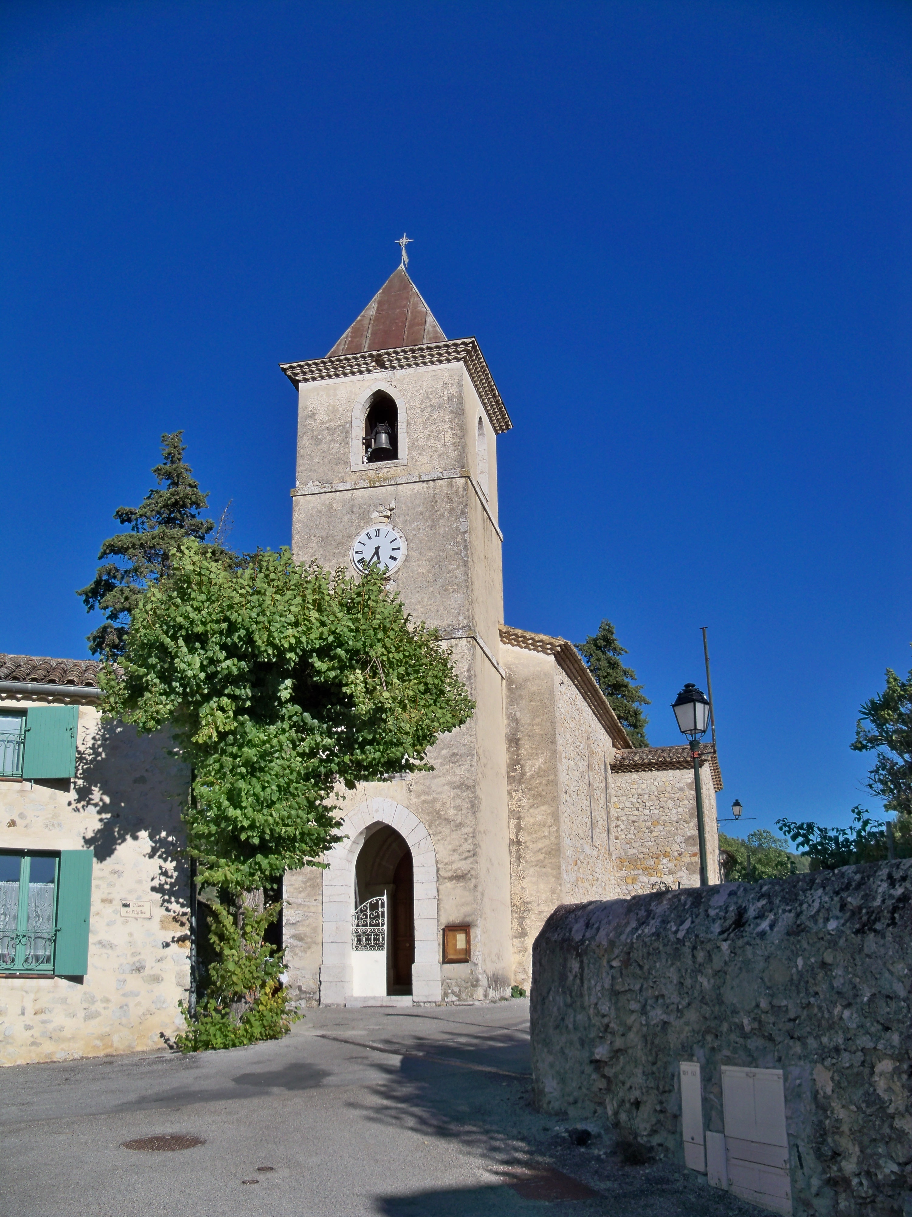 Facade de l'église de Curnier (26)